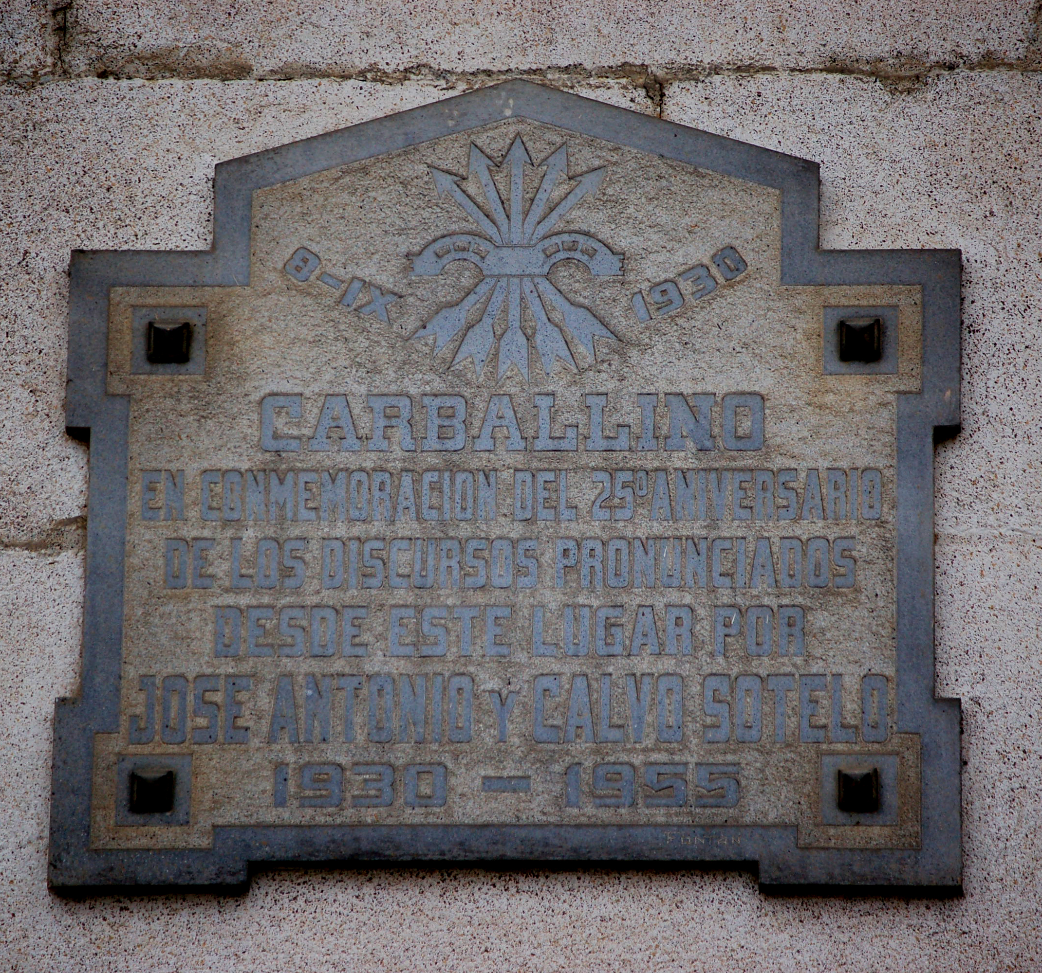 Placa no número 2 da rúa Cánovas del Castillo do Carballiño co seguinte texto:8-IX-1930CARBALLINOEN CONMEMORACIÓN DEL 25º ANIVERSARIODE LOS DISCURSOS PRONUNCIADOSDESDE ESTE LUGAR PORJOSÉ ANTONIO Y CALVO SOTELO1930-1955